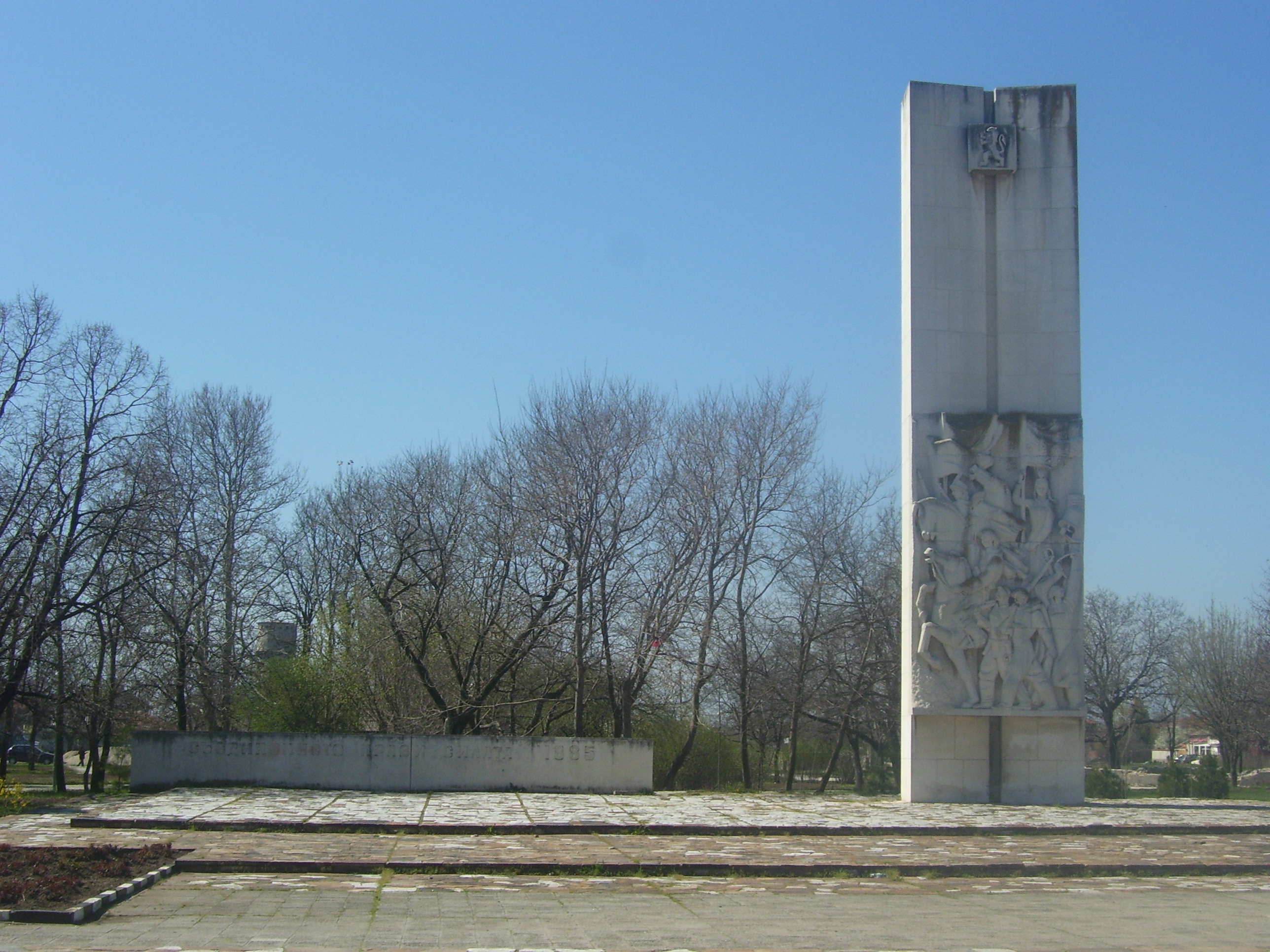 Паметникът на Съединението в град Съединение (Голямо Конаре), България.